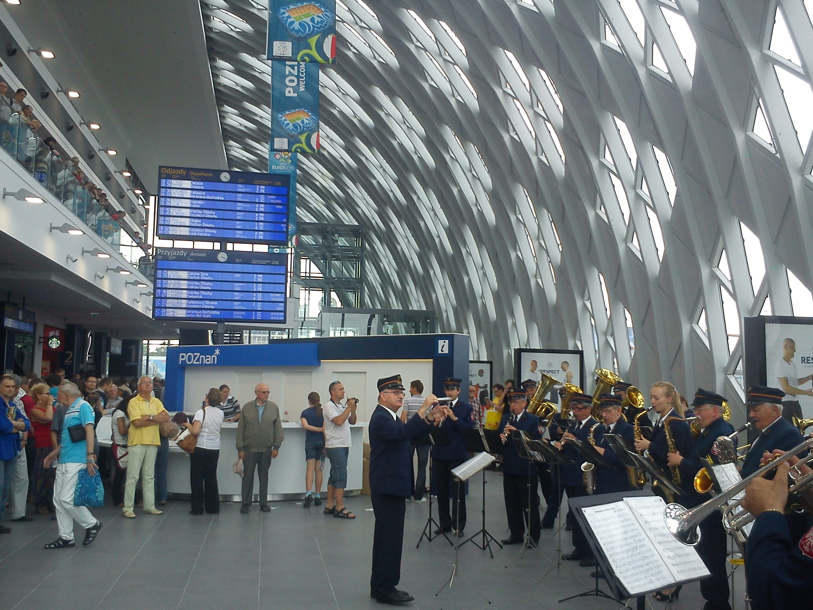 Otwarcie nowego dworca głównego w Poznaniu (Poznań Główny). 29 maja 2012r.